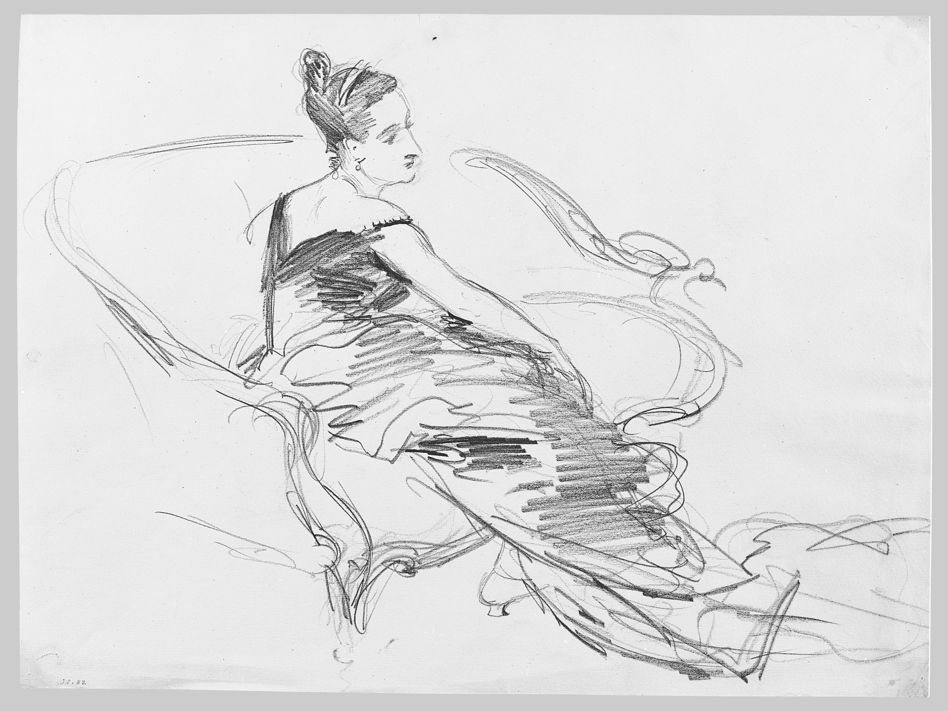 Drawing; Drawings